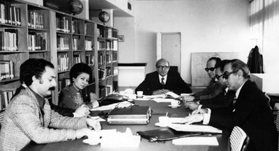 شورای استادان گروه جغرافیا در دهه ۱۳۴۰ خورشیدی پس از استقلال رشته جغرافیا